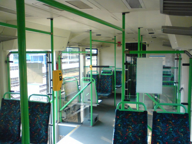 Wnętrze SA106-007